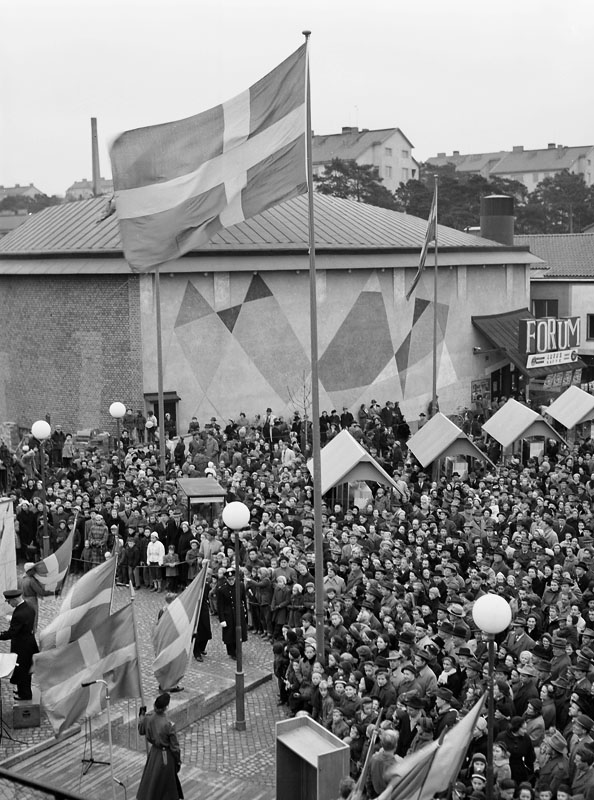 Invigning av Årsta centrum den 1 november 1953. Årsta centrum ritades av arkitektbröderna Erik och Tore Ahlsén, vilka även också målade motiven på fasaderna